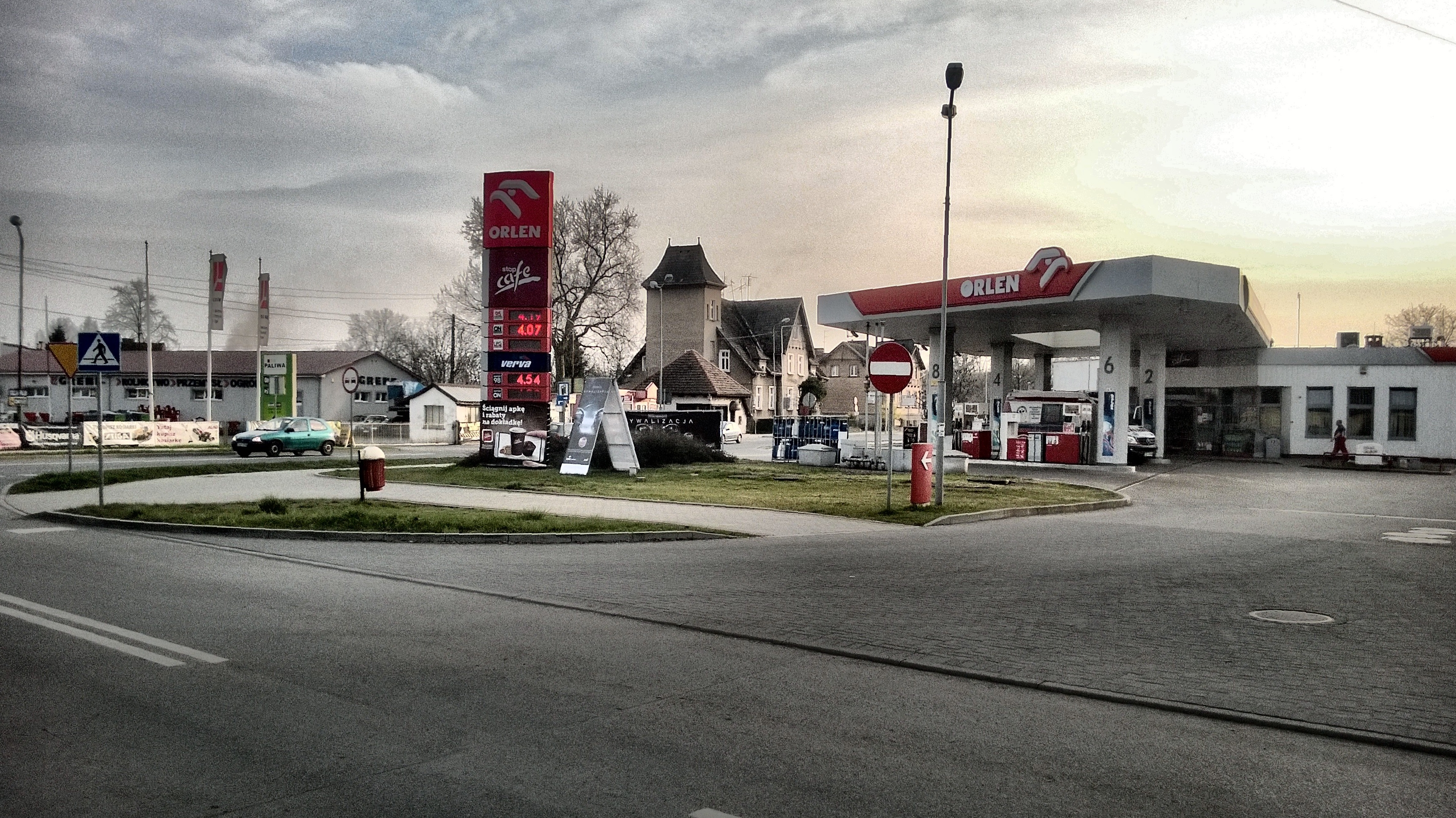 Chojna, Poland